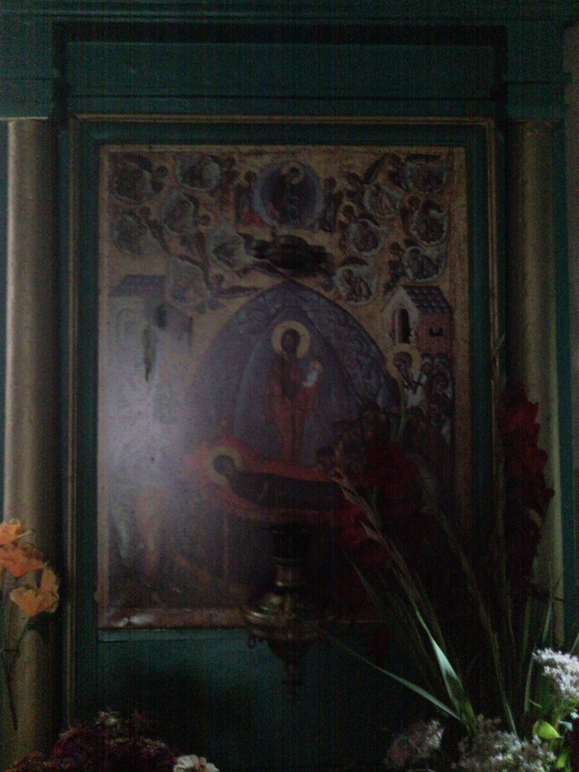 Борсків. Церква Нерукотворного Хреста. Інтер'єр